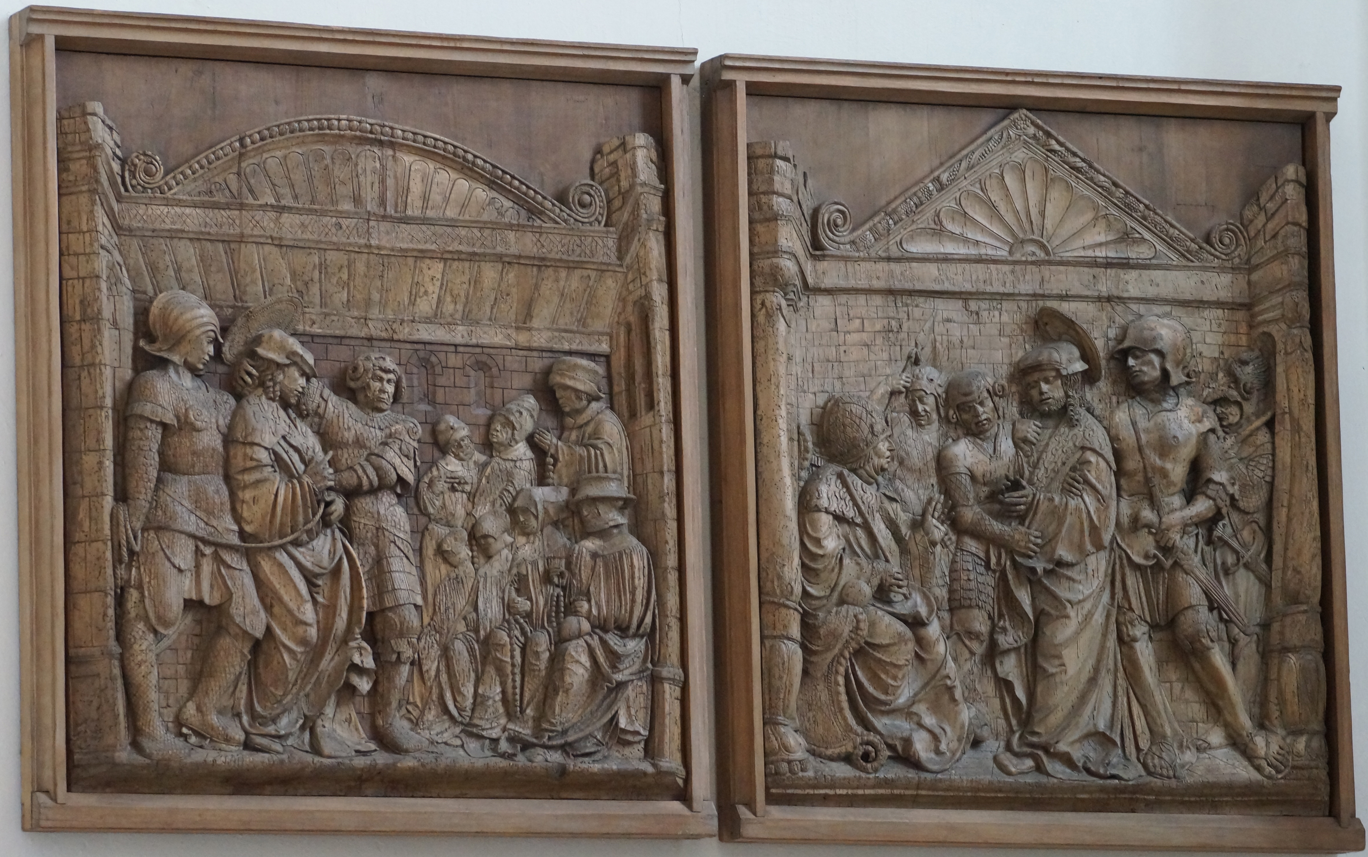 Altartafeln des Leinberger-Altars im Kastulusmünster von Moosburg an der Isar. Dargestellt sind Festnahme und Verhör des Kastulus.